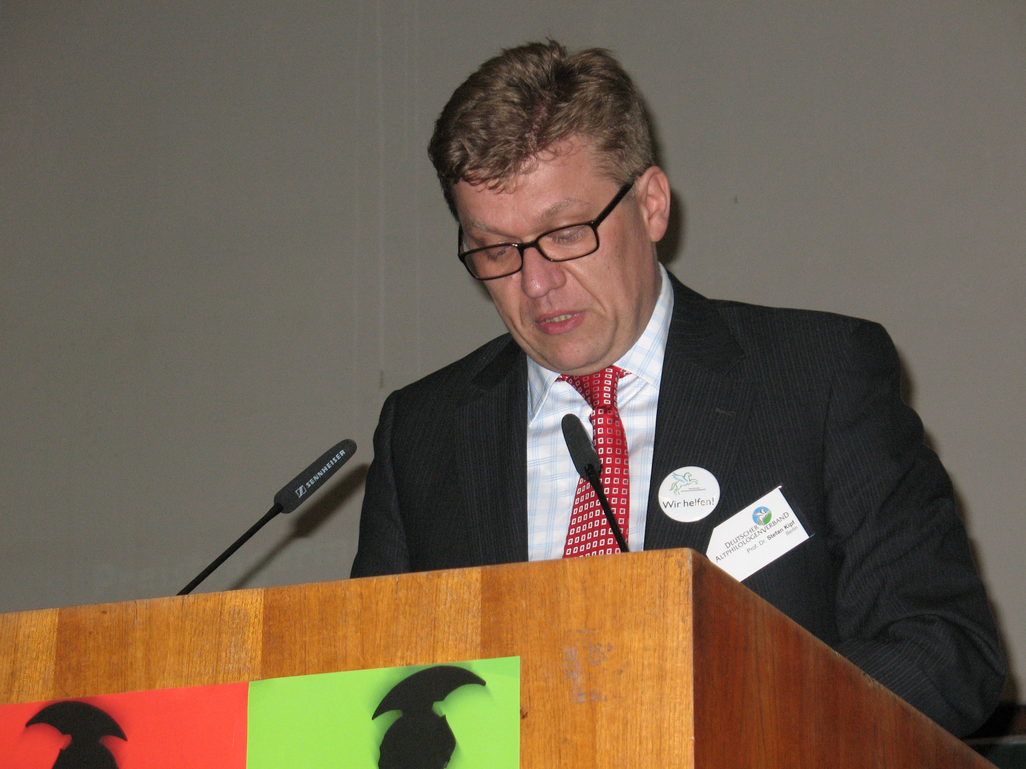 Prof. Dr. Stefan Kipf, Vorsitzender des Deutschen Altphilologenverbandes, bei der Eröffnung des Bundeskongresses des DAV 2008 im ZHG der Universität Göttingen